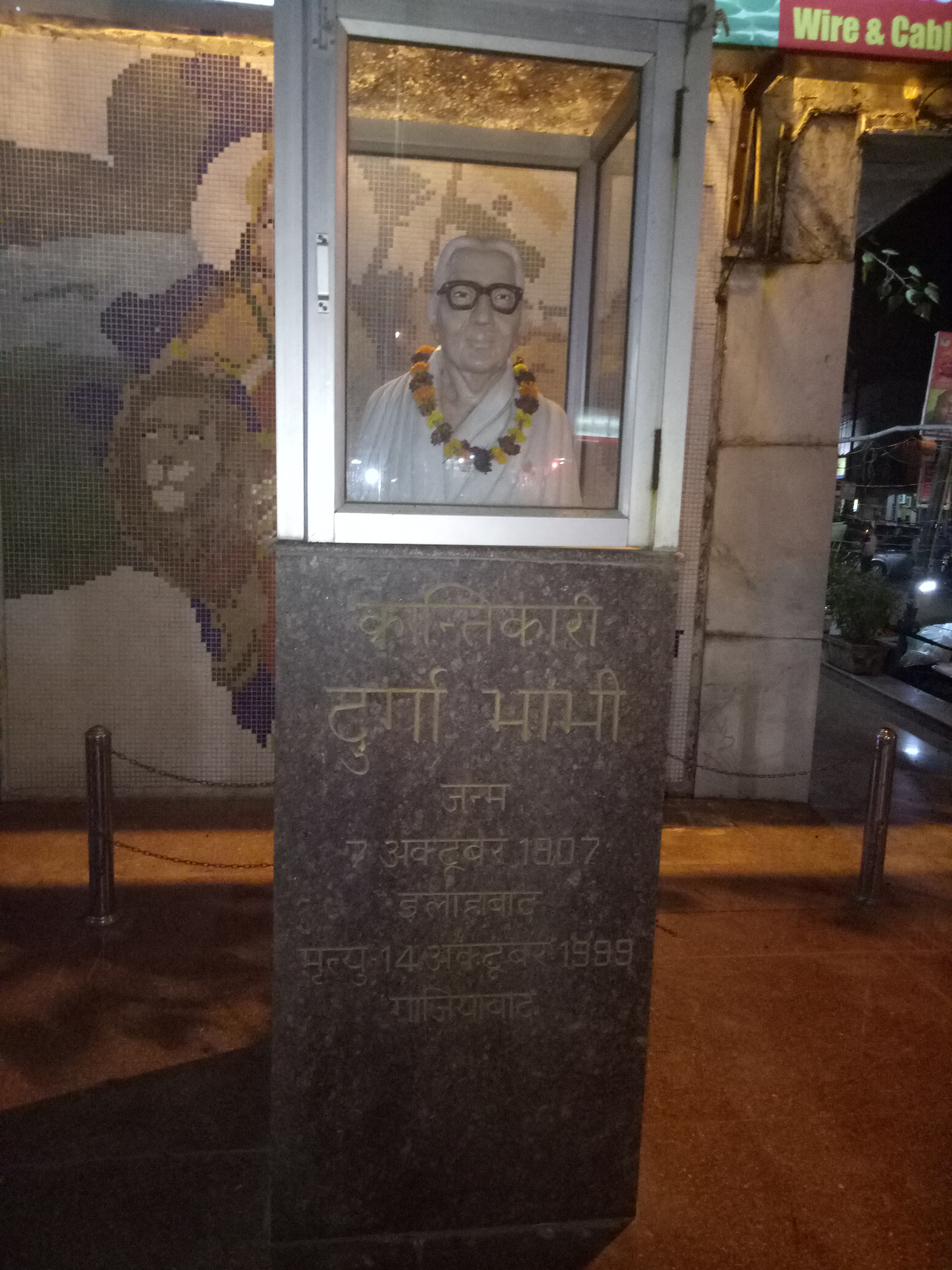 भारत माता दुर्गावती देवी